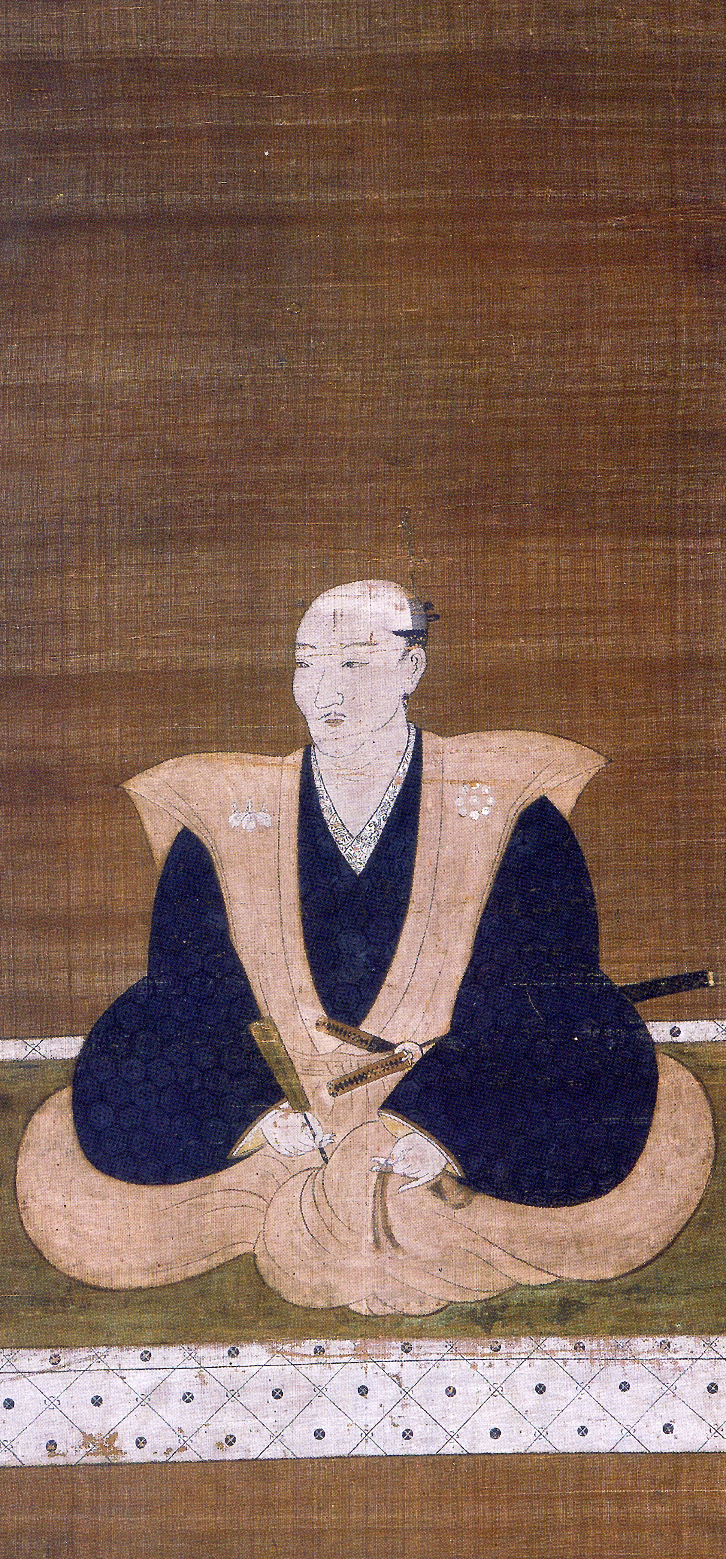 長好連(長連龍の長男)の肖像。